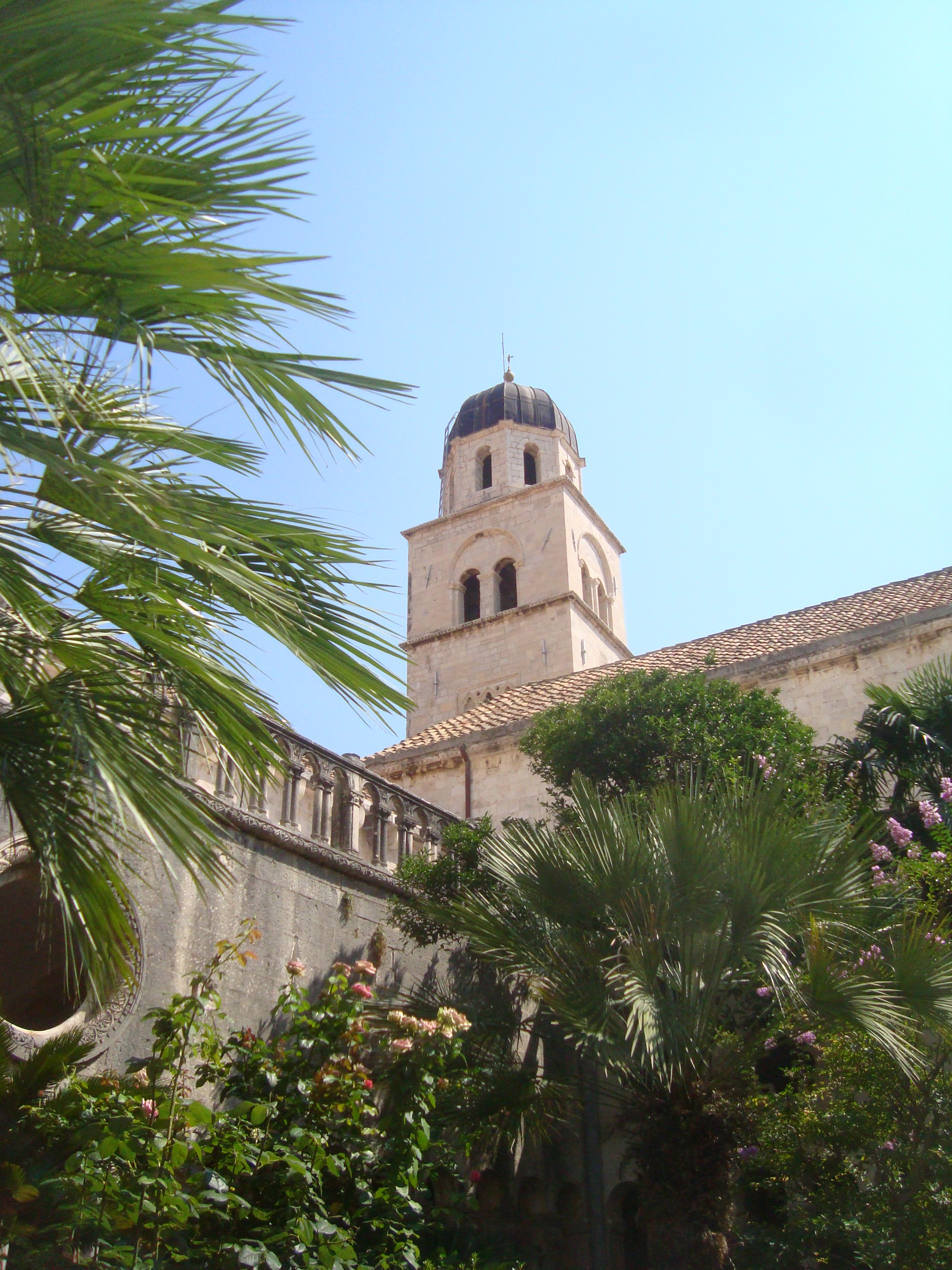 Le clocher vu cloitre roman du monastère franciscain de Dubrovnik en Croatie